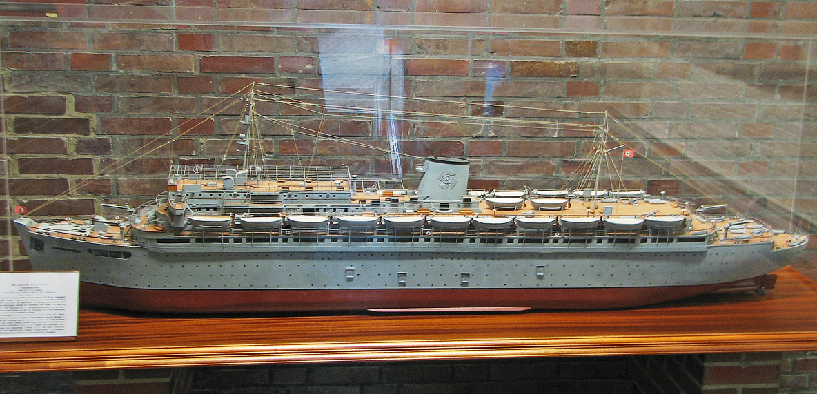 Dieses Bild zeigt ein Modell des Passagierschiffs „Wilhelm Gustloff“, ausgestellt im Marineehrenmal Laboe.